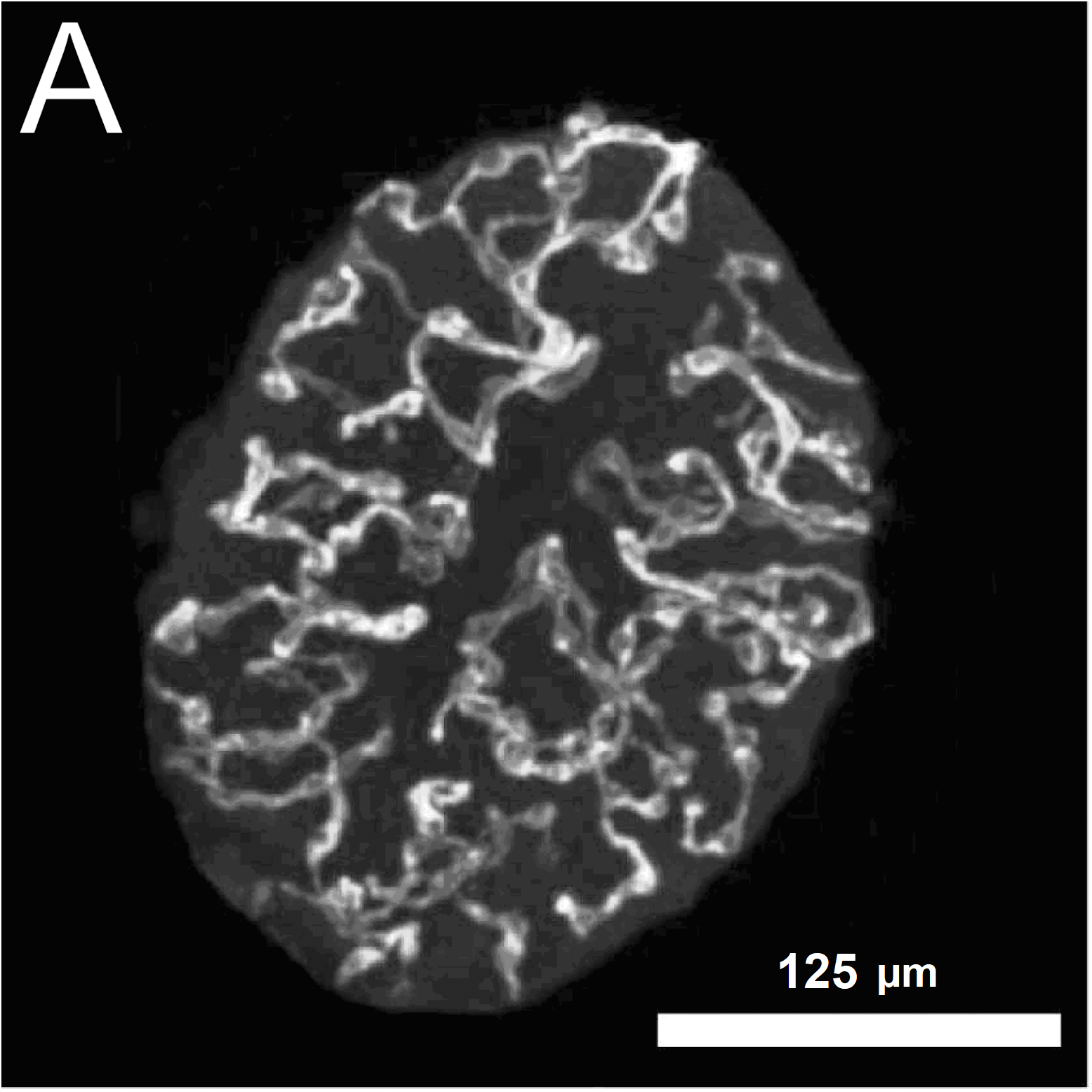 Figura 2 A. Efecto del flujo fluído sobre el área y la longitud conectada de las células endoteliales. Se observa un islote aislado, recién obtenido de un páncreas donante. Se muestran los capilares como bucles y ovillos blancos dentro del islote. Demuestra la abundante vascularización capilar, característica del interior del islote pancreático. Inmunohistoquímica: etiquetado con anti-PECAM-1 (Plaqueta Endotelio Célula Adhesión Molécula) que se adhiere específicamente al endotelio de los capilares. Espécimen: Ratón. Barra 125 µm.